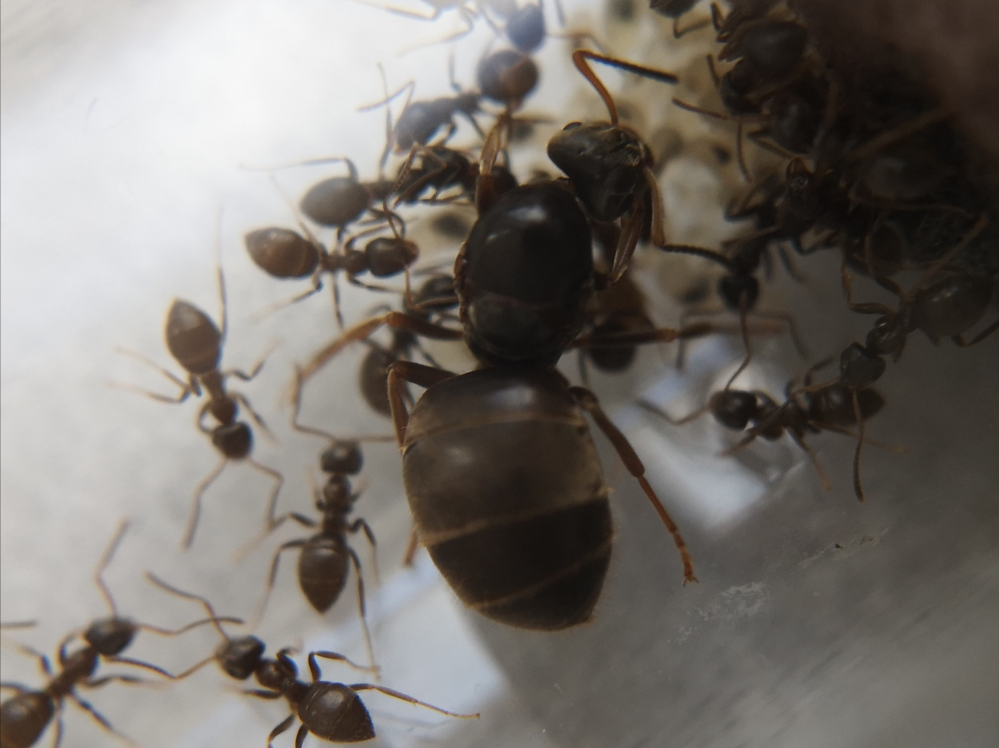 Lasius niger Kolonie mit Königin, Arbeiterinnen und Brut